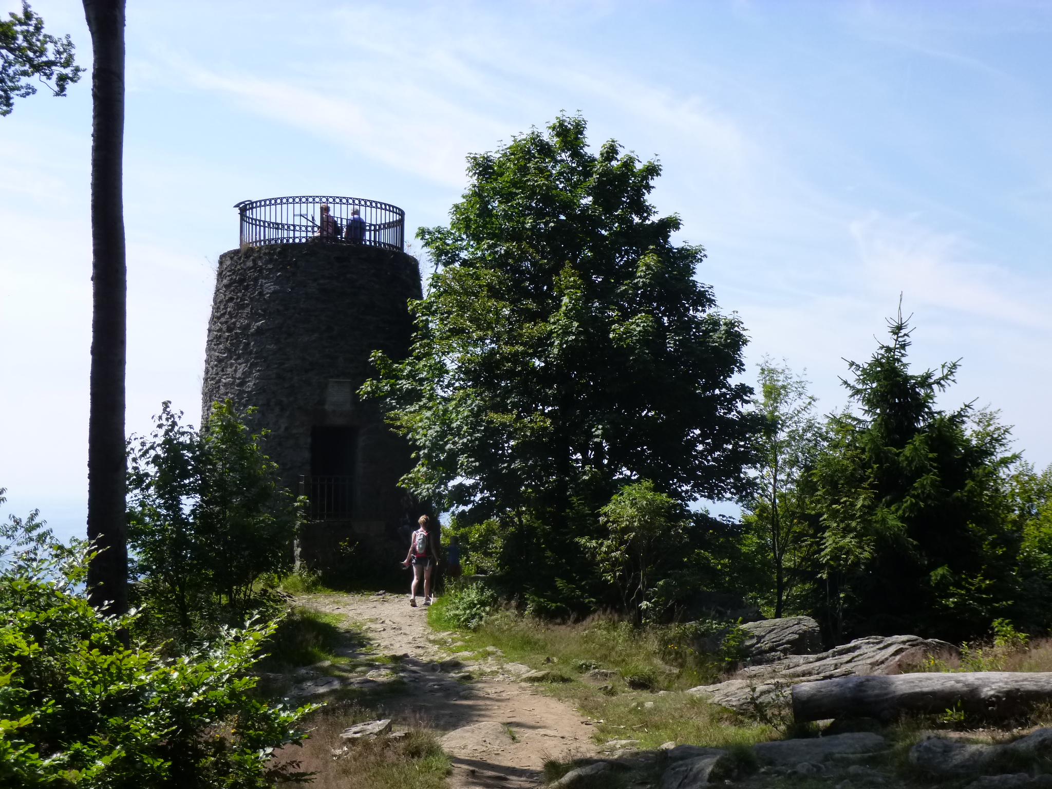 Aussichtsturm auf dem Hirschenstein-Gipfel, 1095 m; Landkreis Straubing-Bogen, Niederbayern